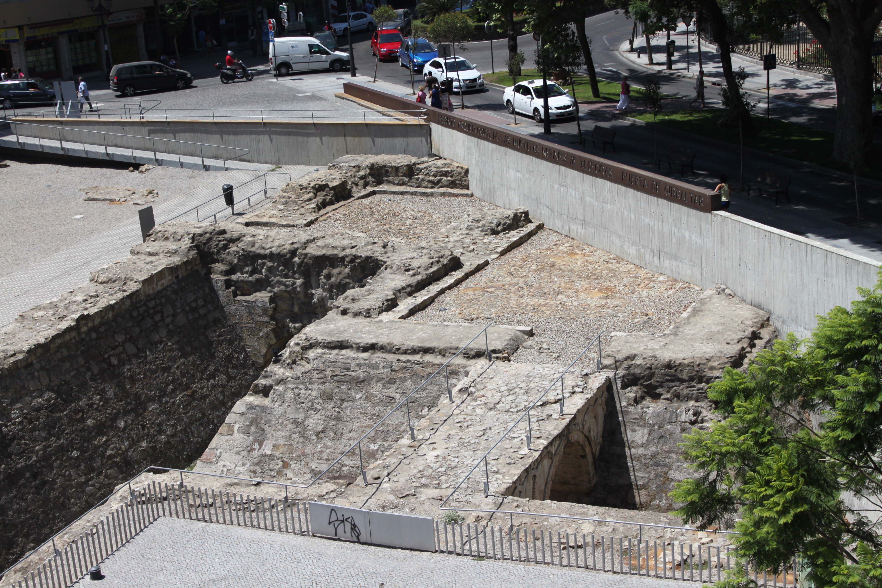 Vista de la Puerta de Gibraltar en el Parque arqueológico de las murallas meriníes. Algeciras, Andalucía, España. Se muestra en el centro de la imagen la planta de la Puerta de Gibraltar con ingreso acodado formado por dos patios separados por una puerta. Rodeando el conjunto aparece el foso salvado por dos puentes, uno de ellos bajo el patio sur de la puerta (izquierda) y otro frente al acceso al patio norte (derecha).